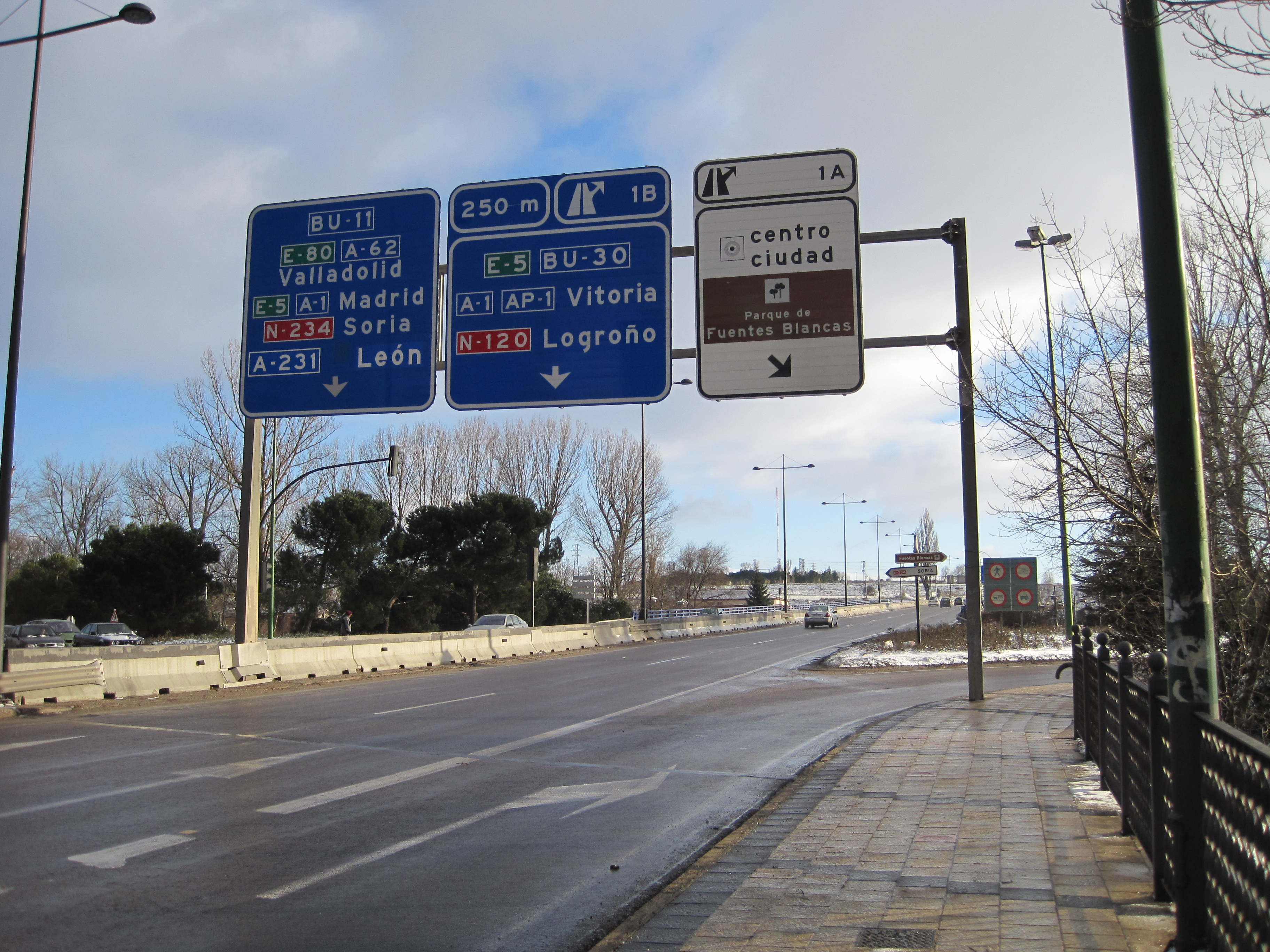 Inicio BU-11